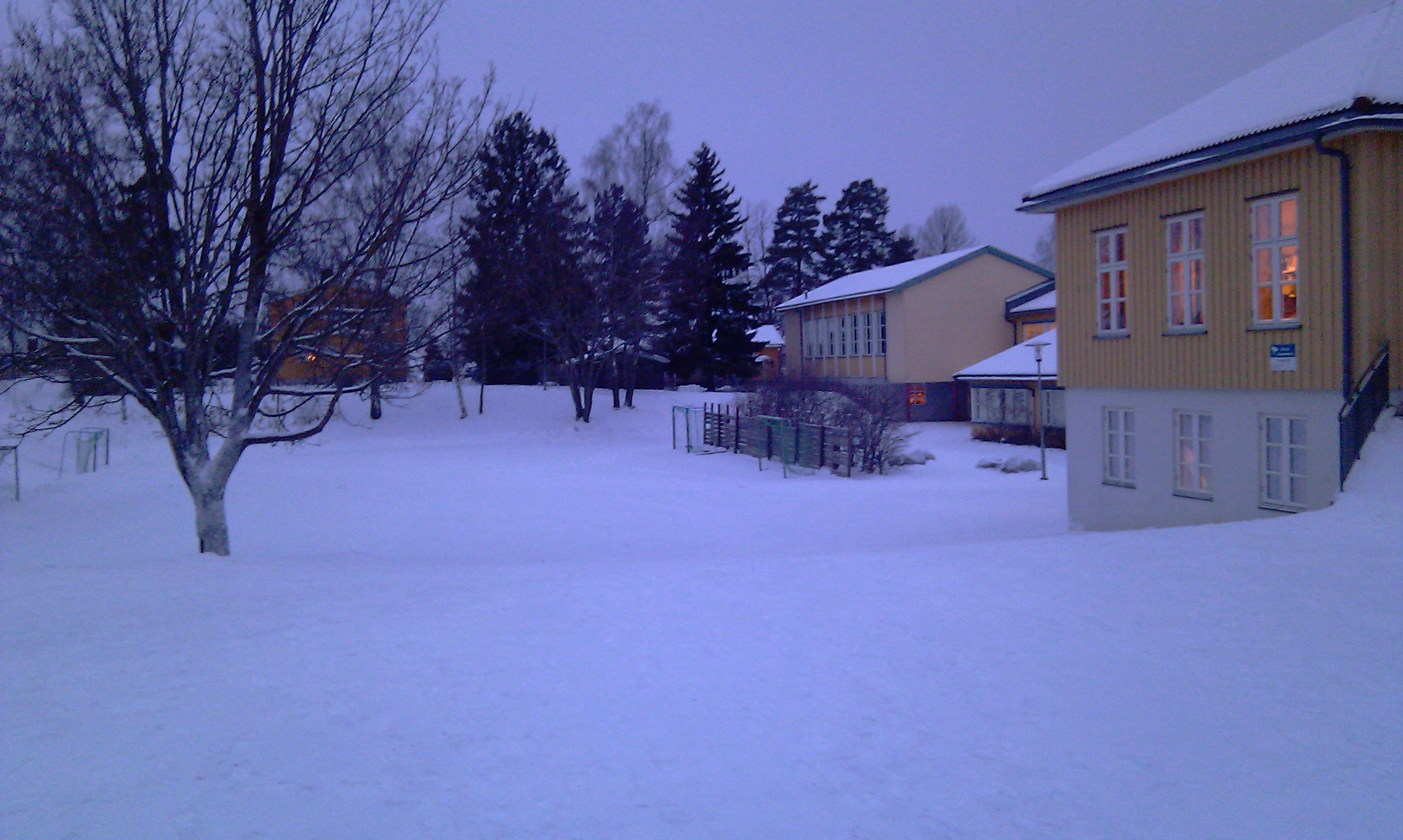 Del av skolegården på Nordby skole